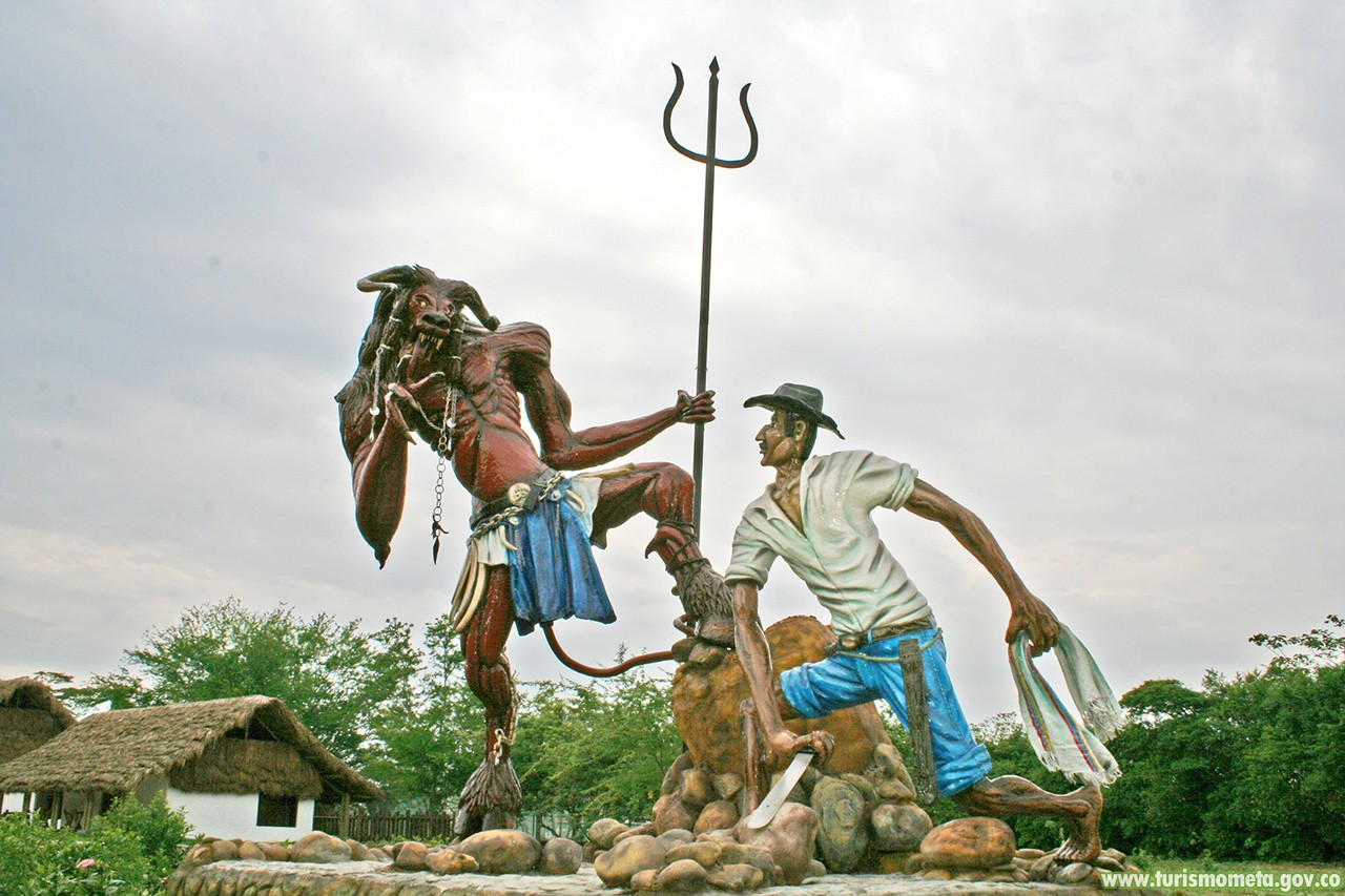 Estatua de Florentino y el Diablo en los llanos venezolanos